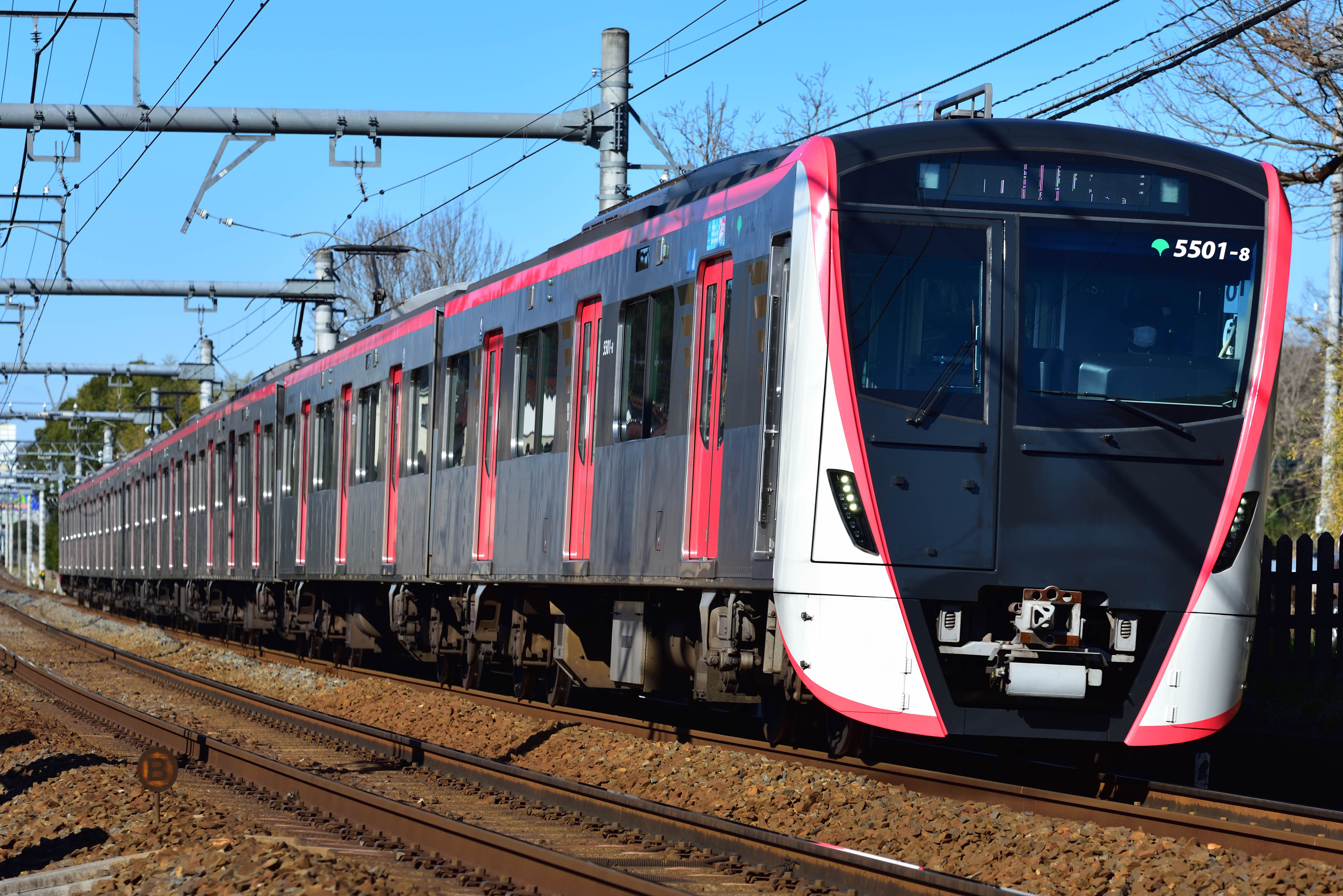 都営5500形 京成本線 京成佐倉～大佐倉。 Nikon D750